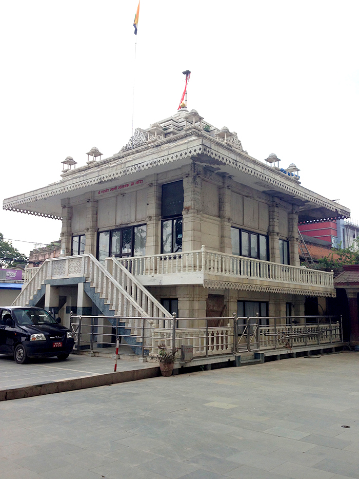 नेपाली: कमलपोखरी स्थित जैन मन्दिर